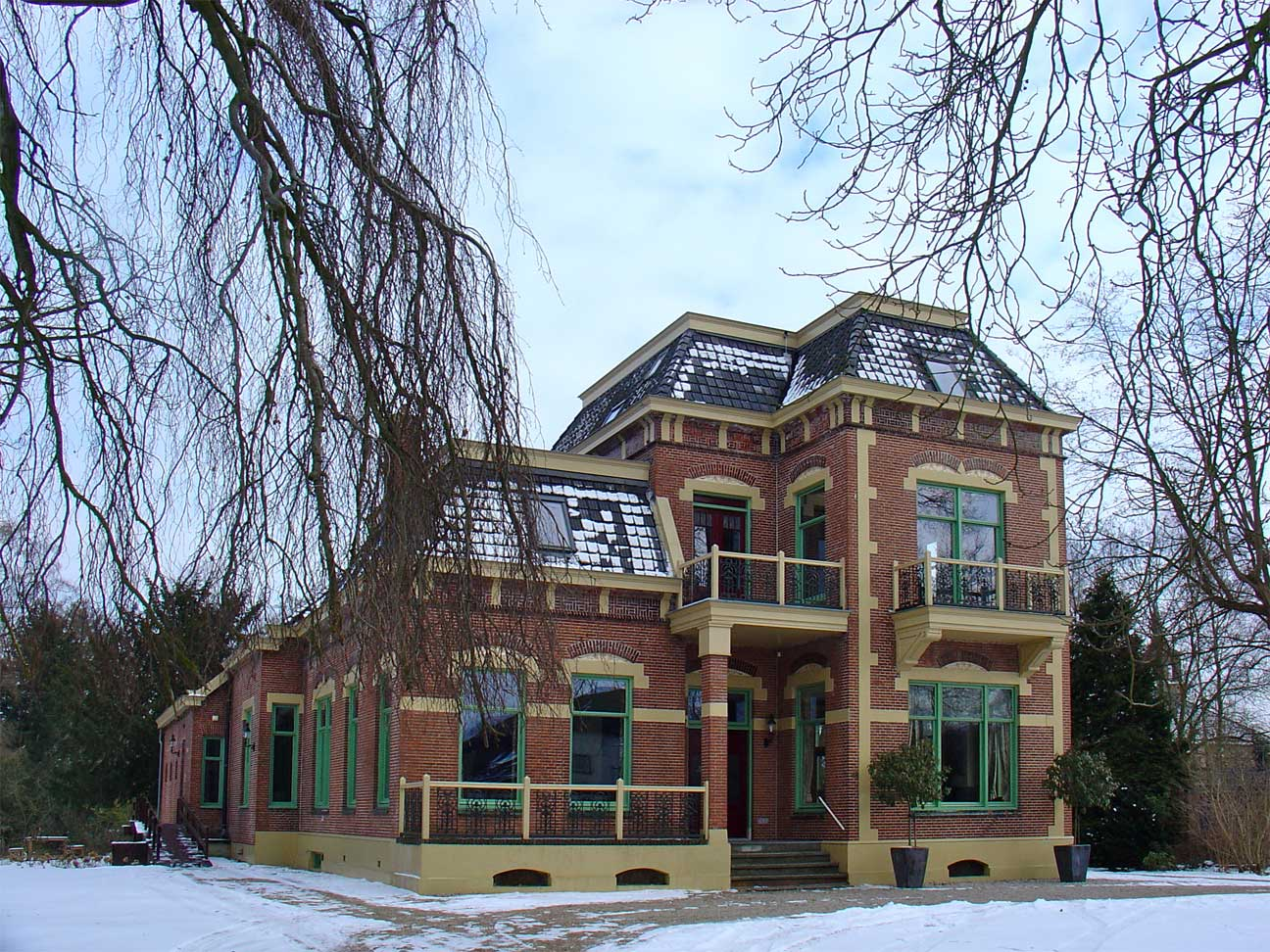 Villa Adams in Gasselternijveen anno 2010